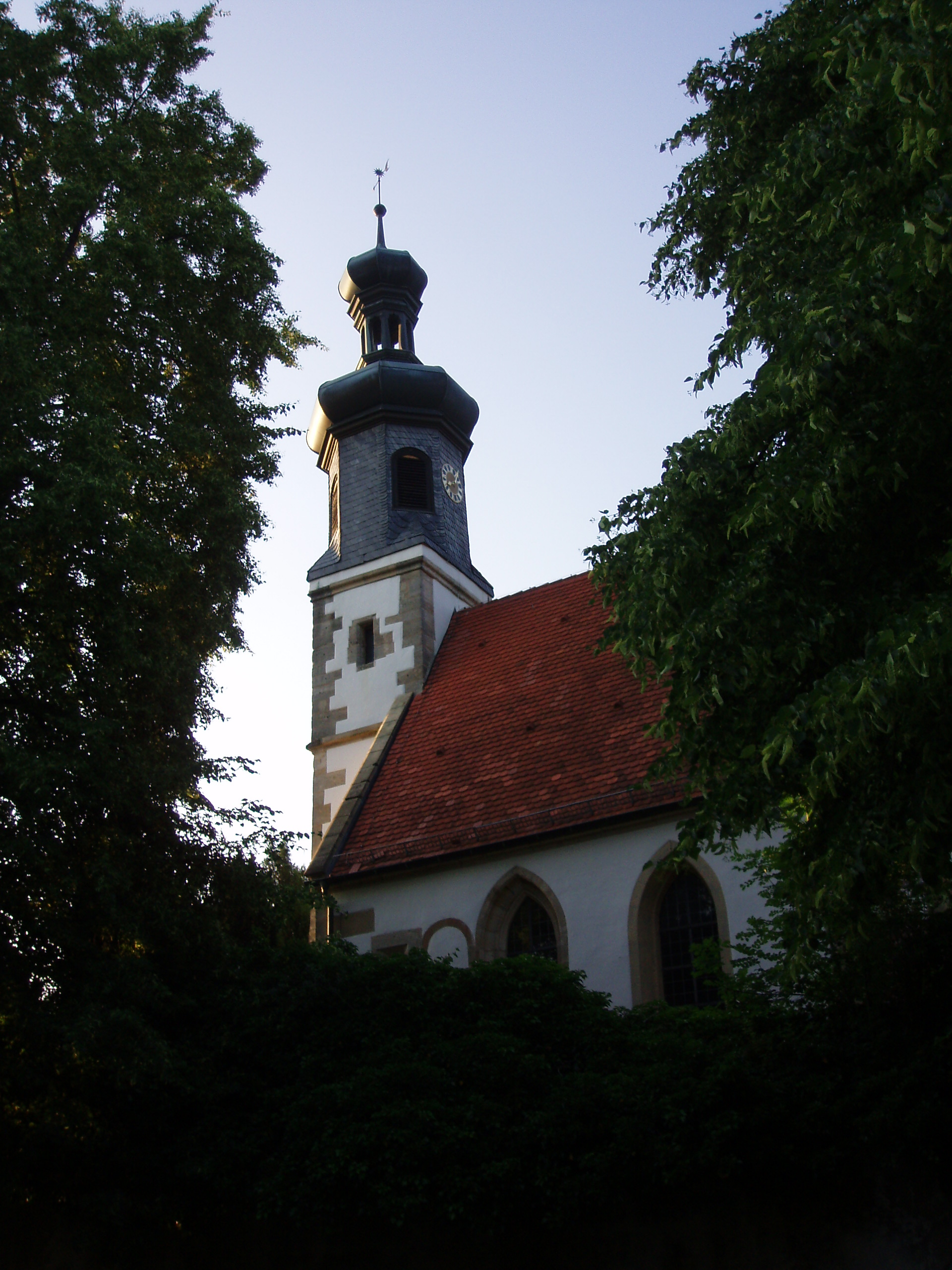 Kloster Adelberg, Ulrichskapelle